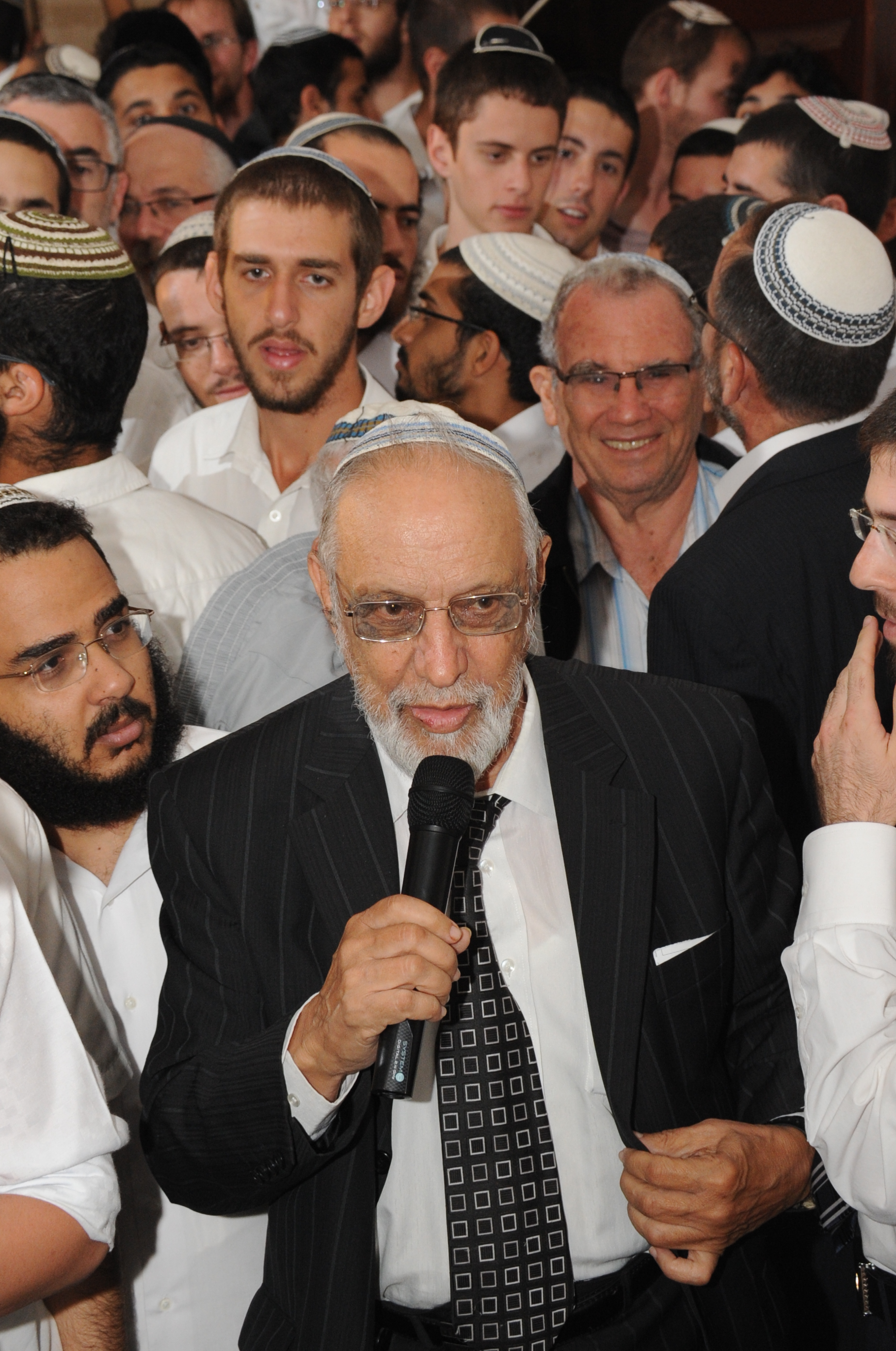 הרב יוסף באגד בשמחת בית השואבה במרכז הרב אומר שיר למעלות